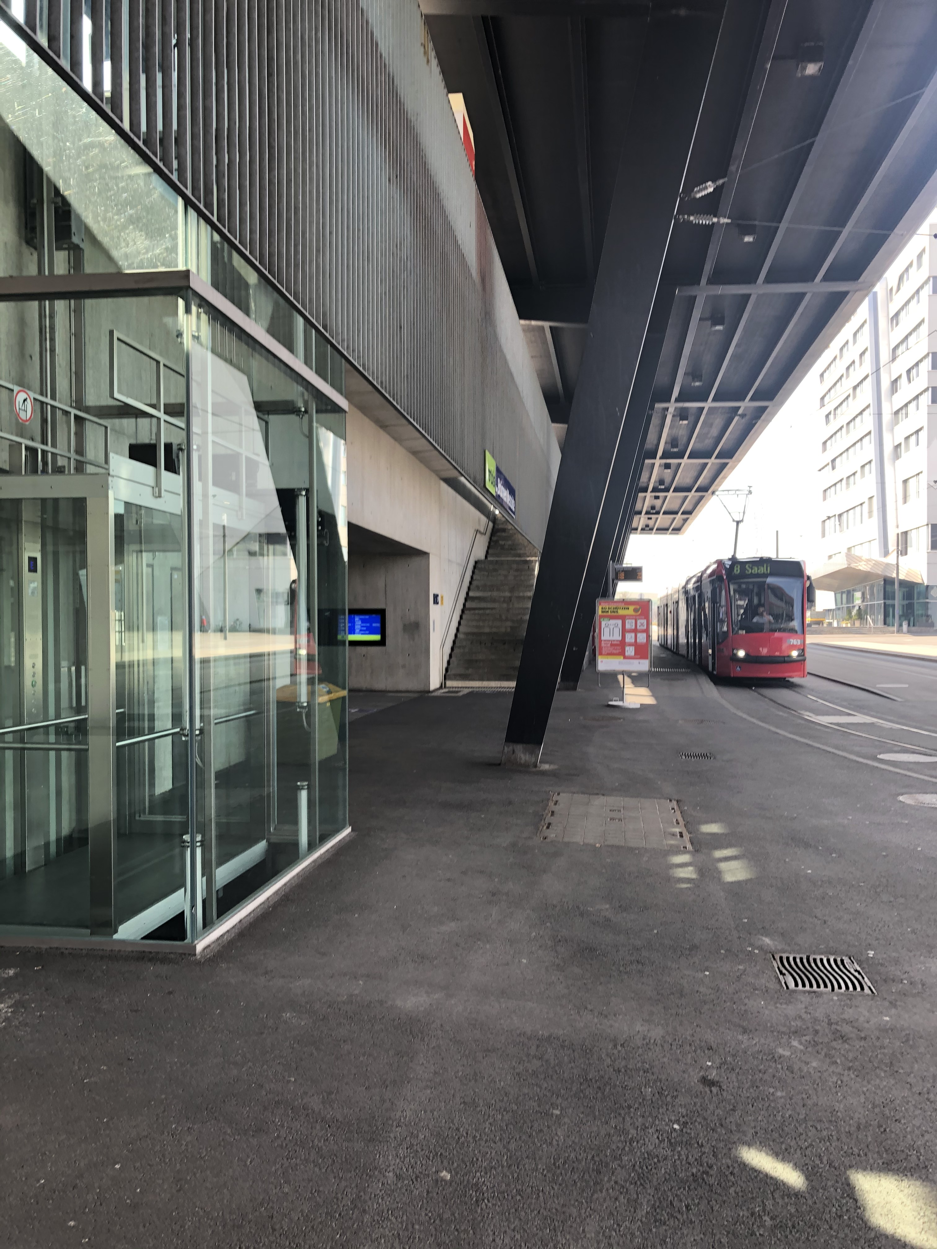 Bahnhof Bern-Brünnen Erdgeschoss mit Haltestelle der Strassenbahn